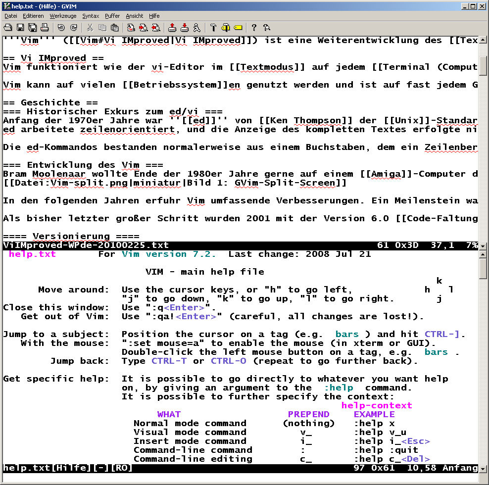 Vim SplitScreen der graphischen Version gVim mit oben: Quelltext des Wikipedia-Artikels über Vim, unten: Vim-Hilfe mit grün hervorgehobenen Schlüsselwörtern (Bsp.: bars), auf die per Doppelklick zugegriffen werden kann und weitere Hilfe erreichbar ist.